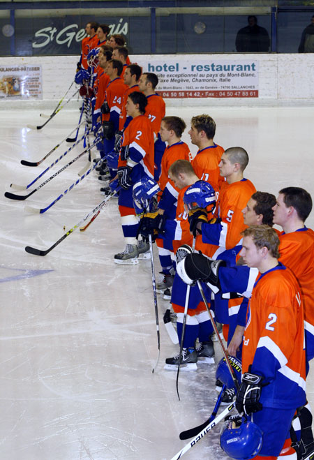 Equipe nationale des Pays-Bas